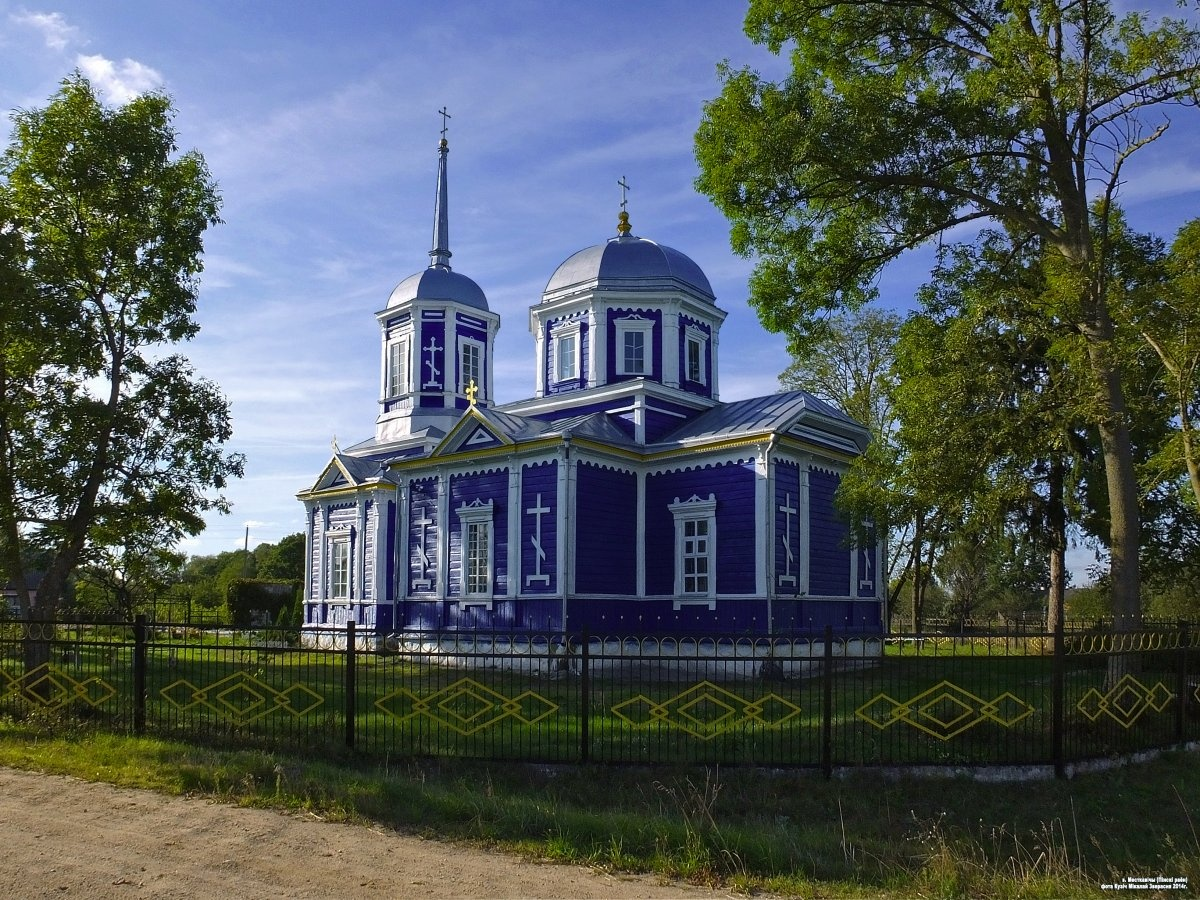 Месткавічы. Свята-Троіцкая царква